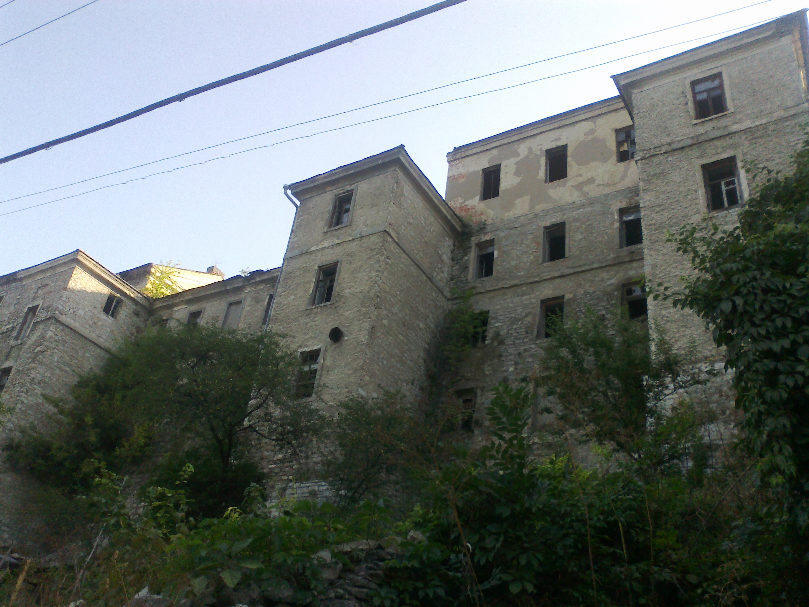 Казарми у Каменці. Сучасне фото